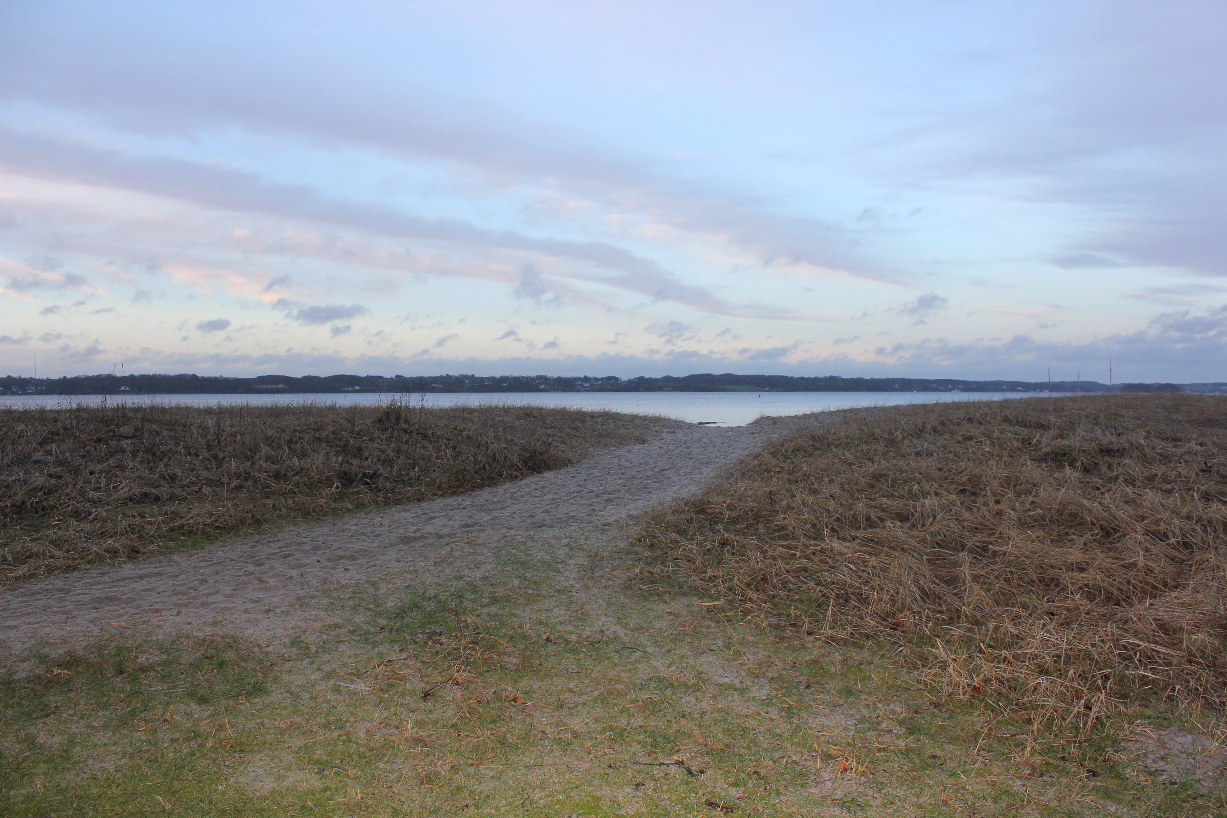 Vom Solitüder Strand blickend nach Dänemark, Bild 07; Das Wort Solitüde kommt aus dem Französischen und bedeuet Einsamkeit